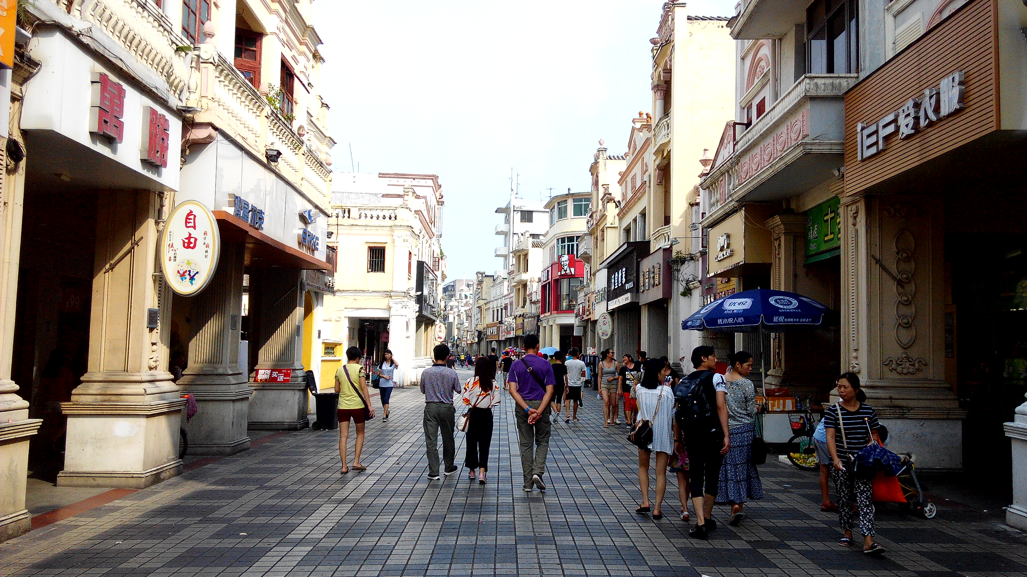 中国广东省江门市台山市 台城商业步行街